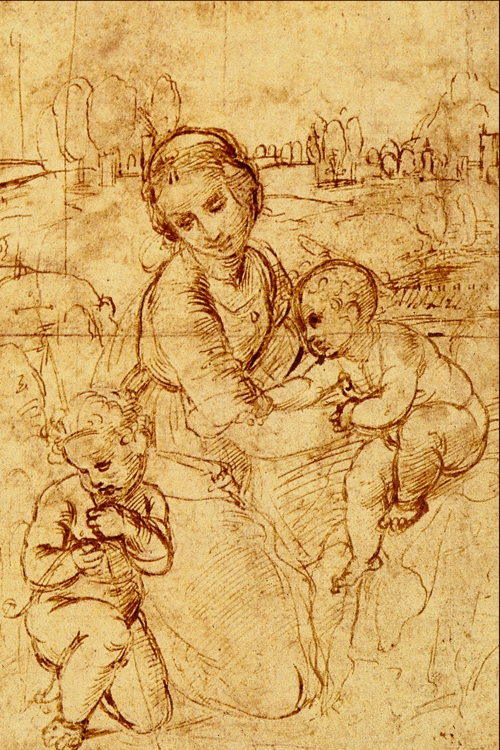 Madonna col Figlio e S. Giovannino